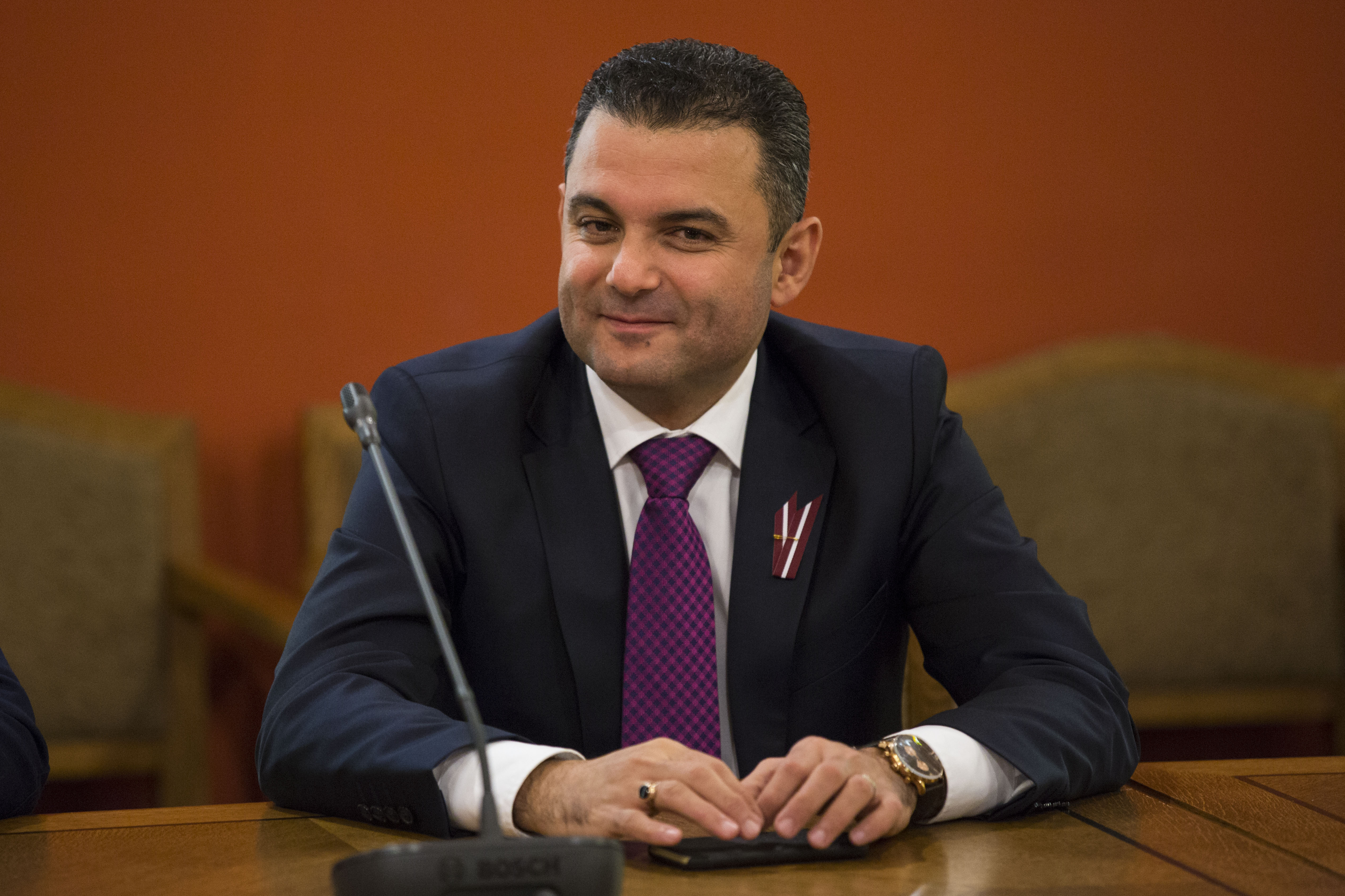 2014.gada 6.novembris. Uz pirmo sēdi sanākusī Saeimas Sociālo un darba lietu komisija ievēl savu vadību. Foto: Reinis Inkēns, Saeimas Kanceleja Izmantošanas noteikumi: saeima.lv/lv/autortiesibas